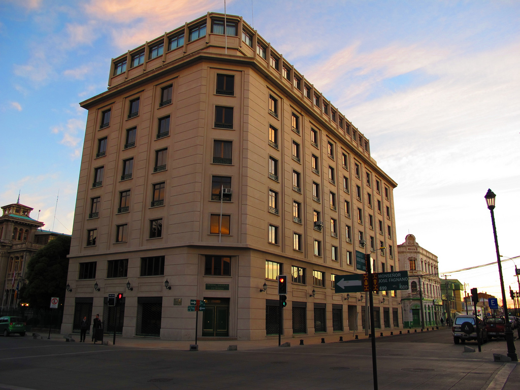 Edificio Enap - Punta Arenas - Chile